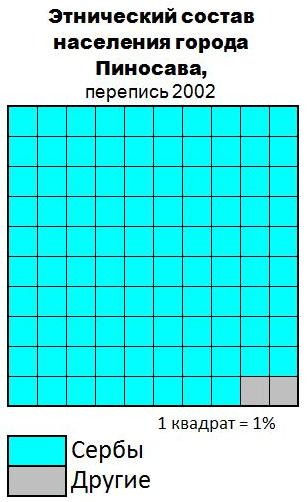 Этнический состав населения города Пиносава (2002)